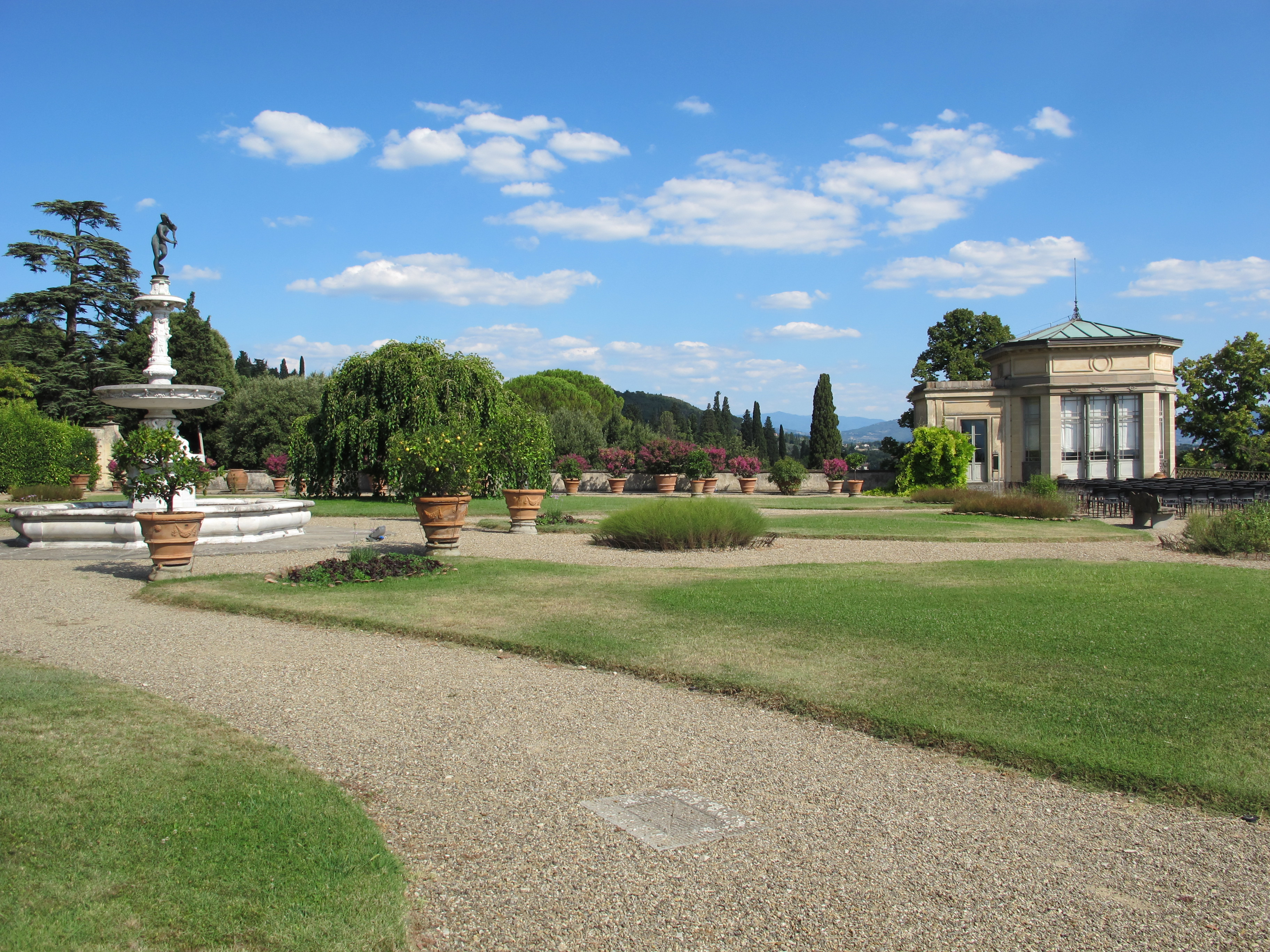 Villa La Petraia e dintorni, Firenze